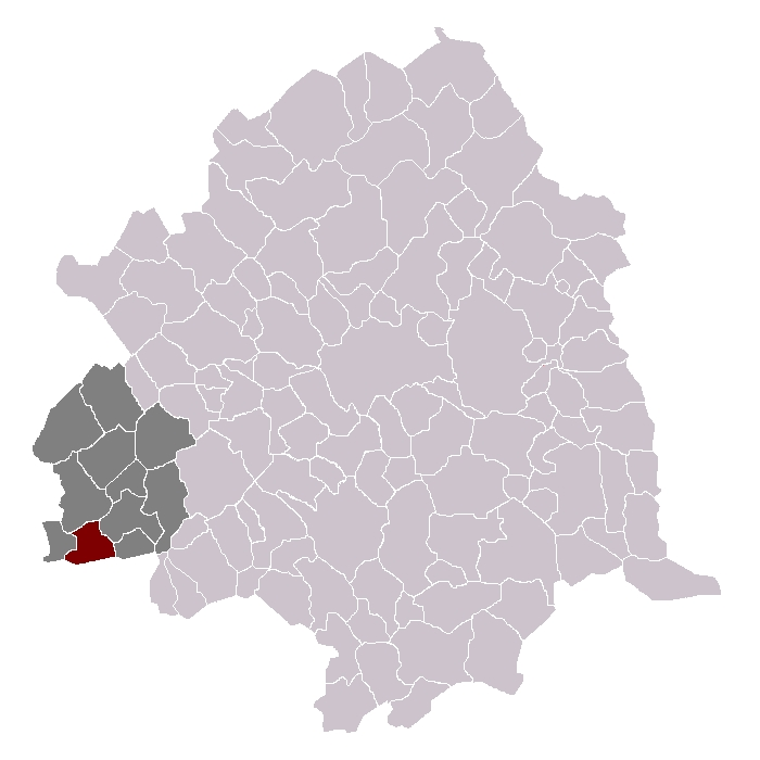 Salomé